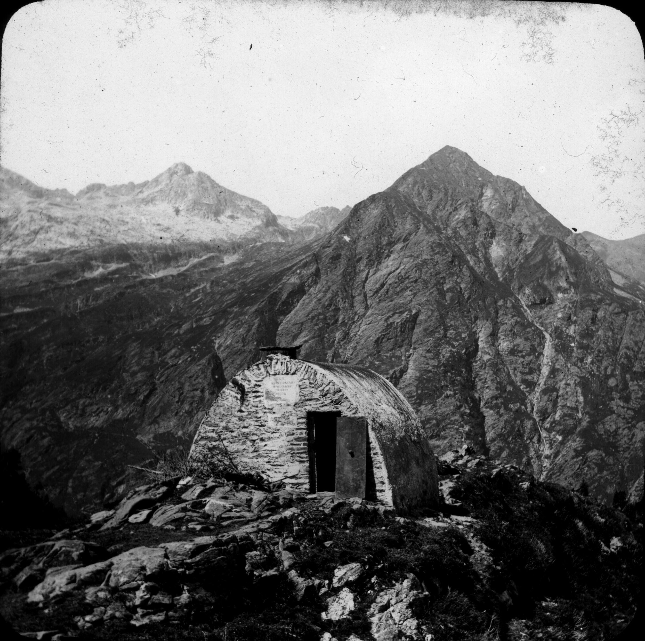 Fonds Trutat - Photographie ancienne Lieu de création : Bagnères-de-Luchon (Haute-Garonne ; canton) Mot(s)-clé(s) : -- Montagne -- Sommet (montagne) -- Pic (montagne) -- Végétation -- Roche -- Refuge (montagne) -- Pierre -- Voûte -- Arc brisé -- Club alpin français. Section (Pyrénées centrales) -- Bagnères-de-Luchon (Haute-Garonne ; canton) -- Lys, Cirque du (France) -- Maupas, Pic du (France) -- Maupas, Refuge de (Haute-Garonne) -- Lys, Vallée du (France) -- Luchonnais, Massif du (France) -- 19e siècle, 2e moitié -- 20e siècle, 1e quart Bibliographie : Frappé (Jean-Bernard). - Autrefois Bagnères de Luchon. Tome II. - Anglet : Atlantica, 2001. - 297 p. ; 15 x 22 cm. - (Autrefois) cf. p. 280-281.